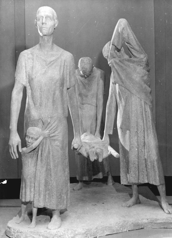 Plastik "Ravensbrück" von Fritz Cremer Zentralbild Eckleben 4.10.1961 Ausstellung "Kunstpreisträger der DDR". Prof. Dr. Hans Pischner, Stellvertreter des Ministers für Kultur der DDR, übergab am 3.10.1961 in einer Feierstunden in der National-Galerie der Staatlichen Museen zu Berlin die repräsentative Ausstellung zu den Berliner Festtagen und zur 12. Wiederkehr des Jahrestages der DDR "Kunstpreisträger der Deutschen Demokratischen Republik" der Öffentlichkeit. UBz: "Ravensbrück" Entwurf für das Mahnmal des ehemaligen Konzentrationslagers Ravensbrück von Fritz Cremer 1959 60. [Berlin.- Ausstellung der Plastik "Ravensbrück" von Fritz Cremer für die Mahn- und Gedenkstätte für das Konzentrationslager Ravensbrück]